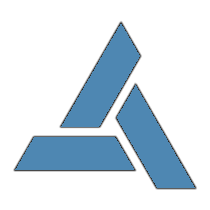 logo Abstergo Industries